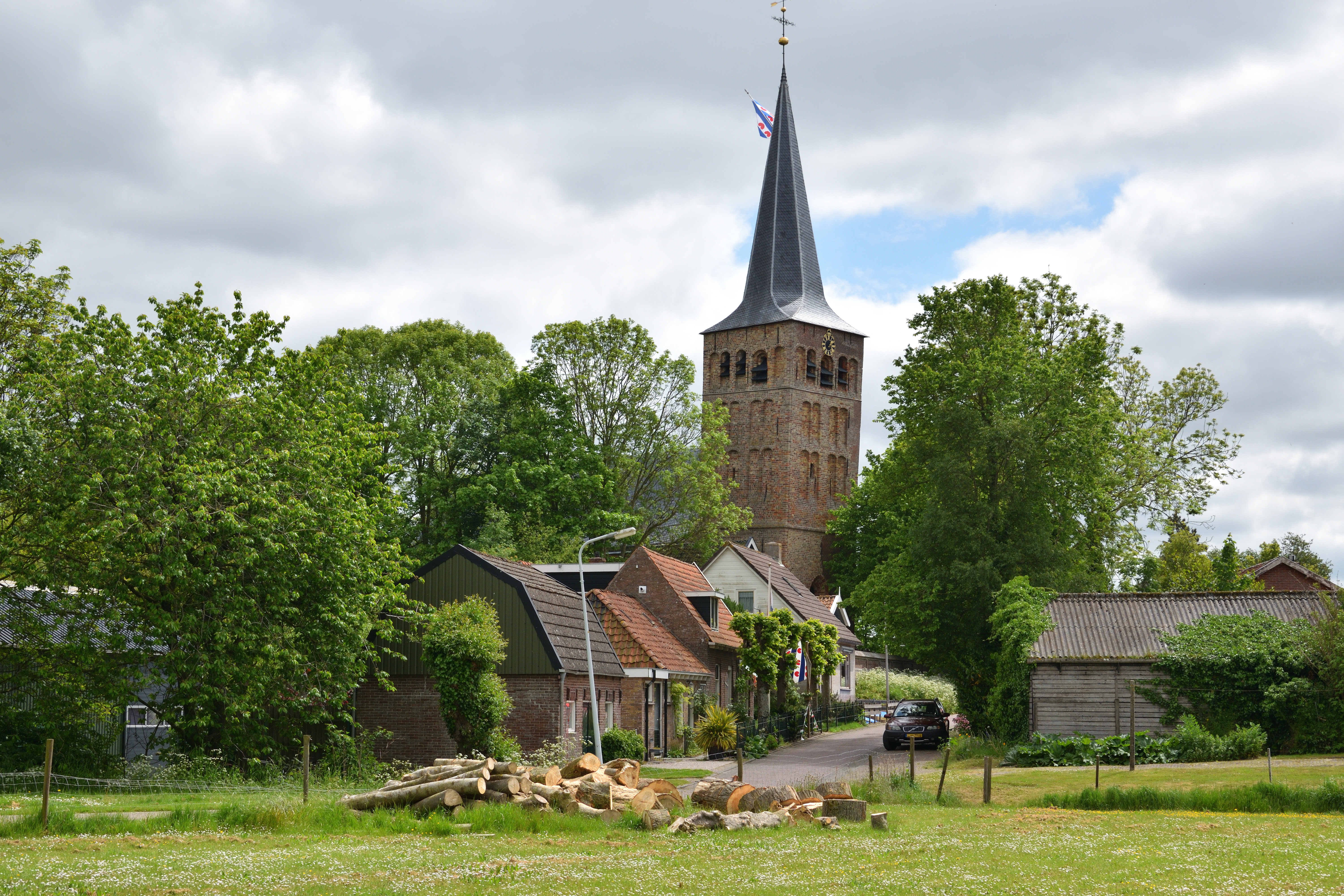 De noordwest kant van het dorp Beetgum of Bitgum in het fries met de toren van de Sint Martinus kerk. de foto is gemaakt in eind mei 2019